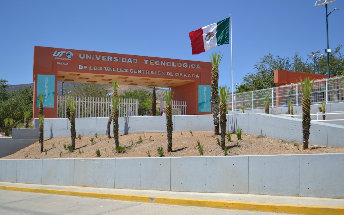 Entrada UTVCO